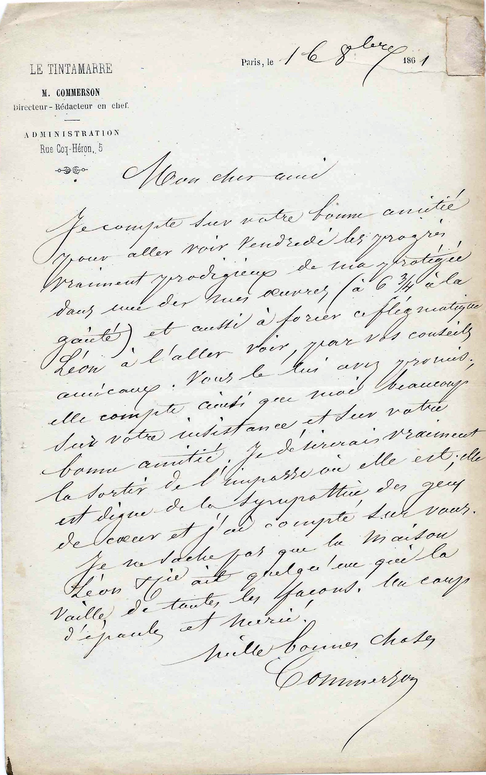 Lettre autographe de Jean-Louis- Auguste Commerson, directeur du Tintamarre , datée de 1861. Scannée par A.Auzas